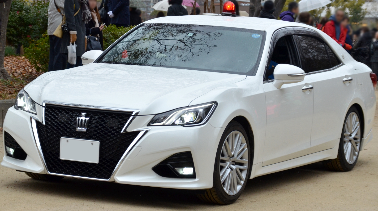 210系クラウンの交通覆面パトカー